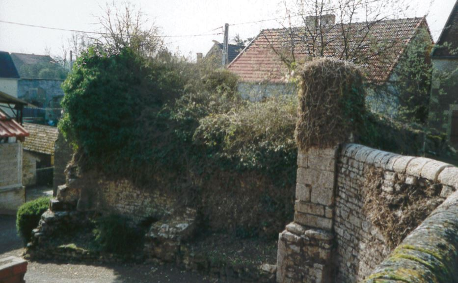 Le chœur de l'église historique en ruine. Côté Nord.